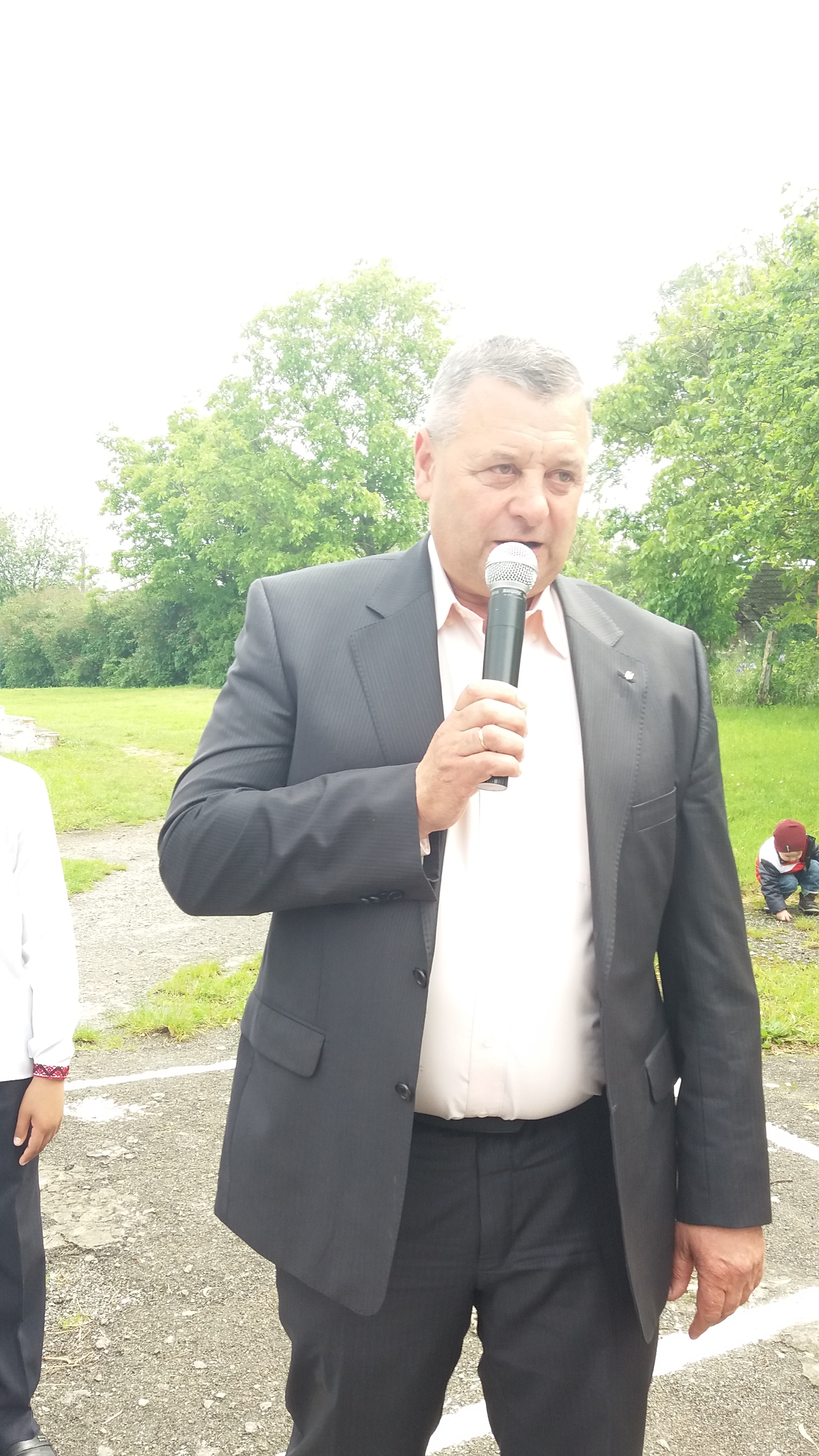 Меценат, депутат Володимир Заліщук.